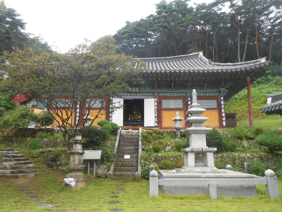 광흥사 응진전 廣興寺 應眞殿